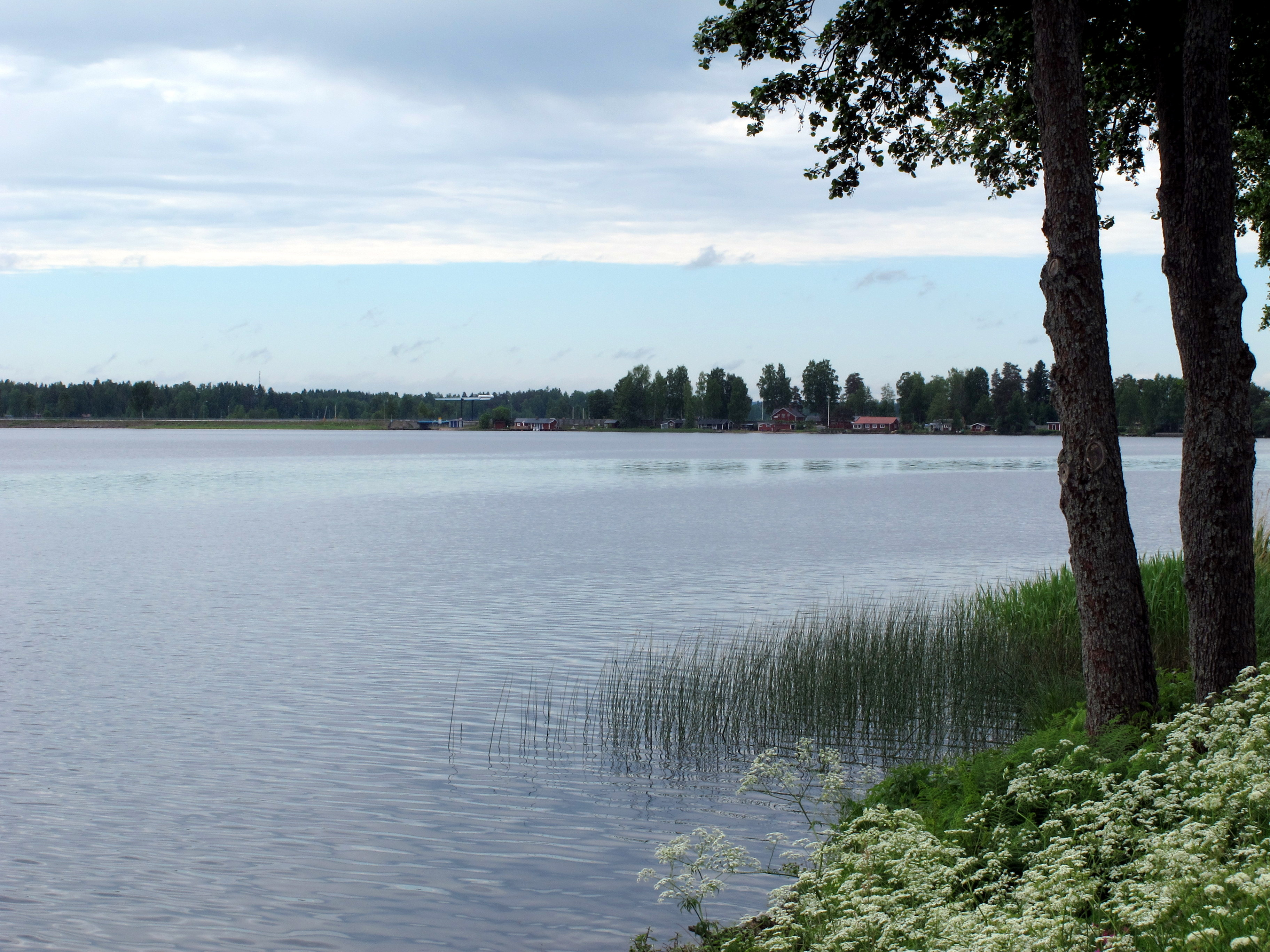 Storsjön nära Årsunda.